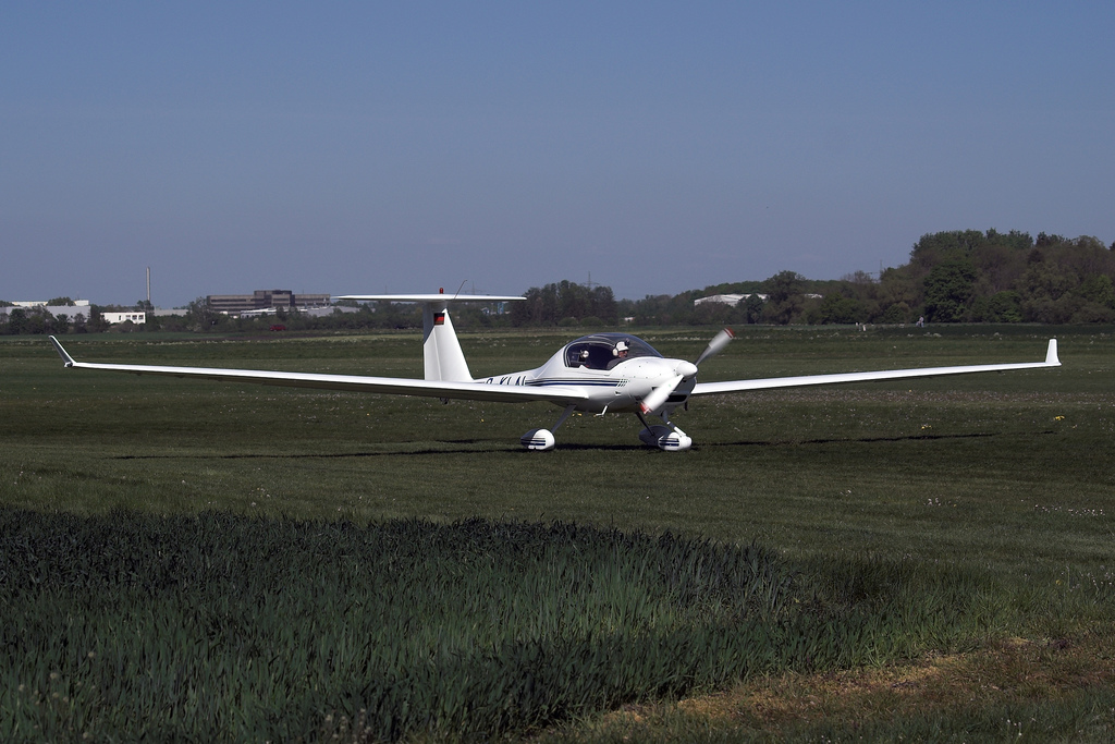 Diamond HK36 "Super Dimona" D-KLAI